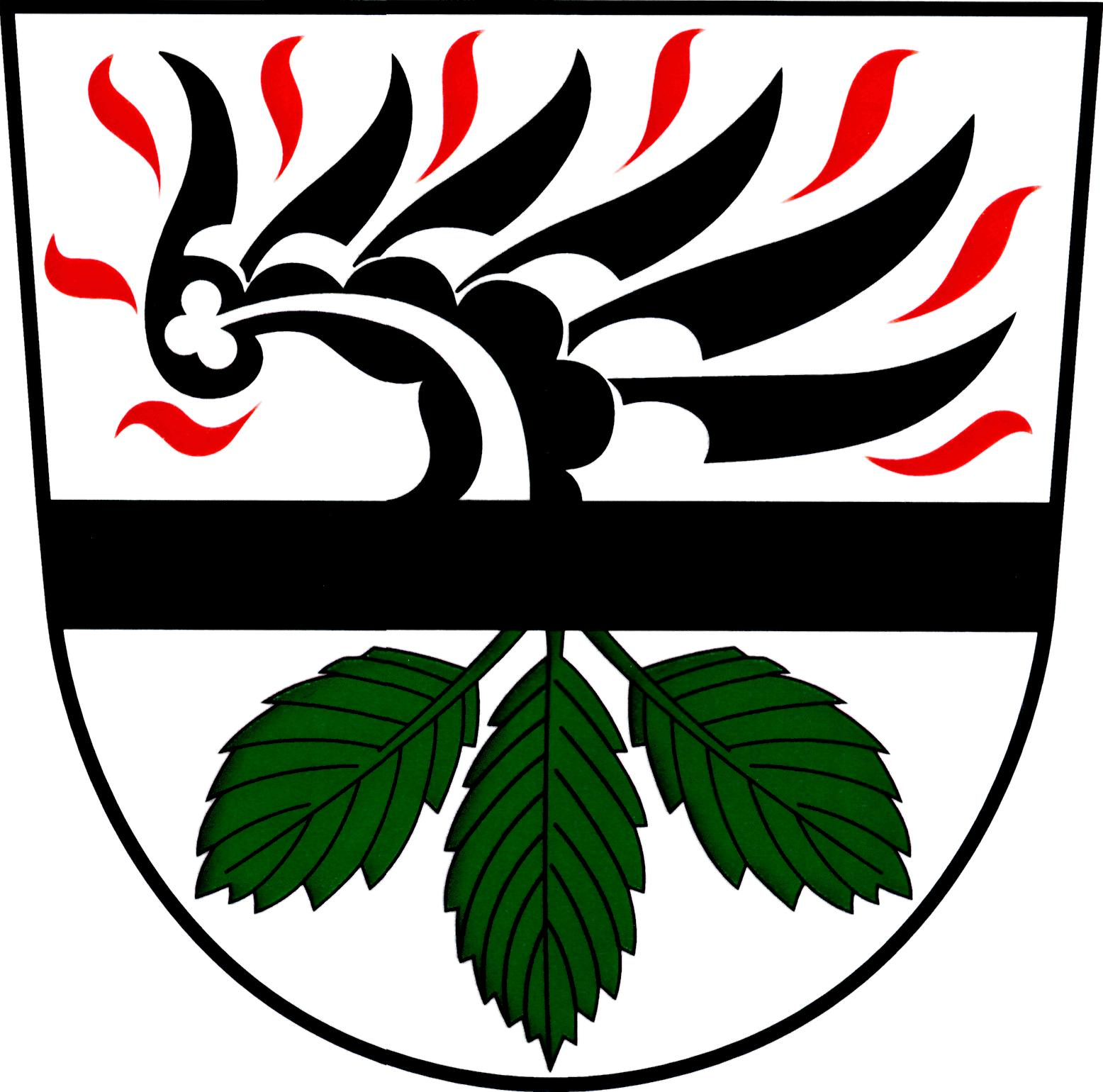 Znak obce Habřina